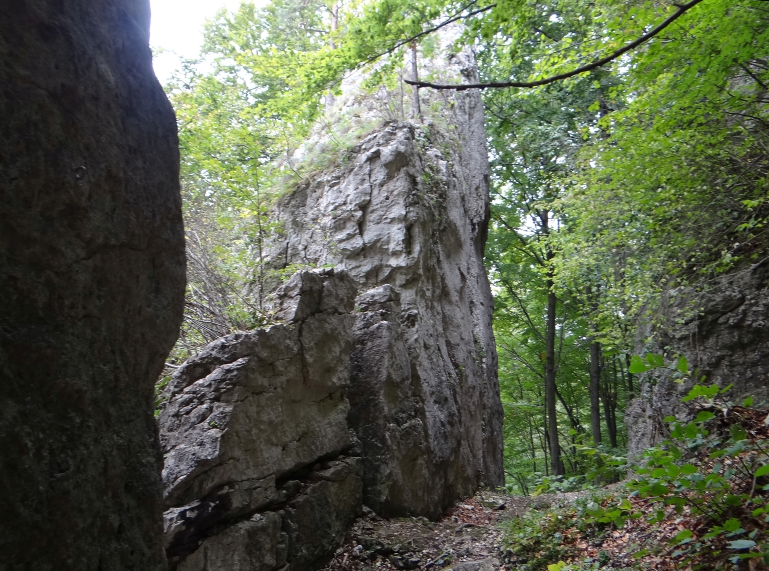 Skały Czarci Korytarz w Dolinie Będkowskiej